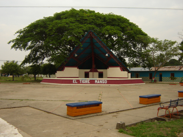 parque principal